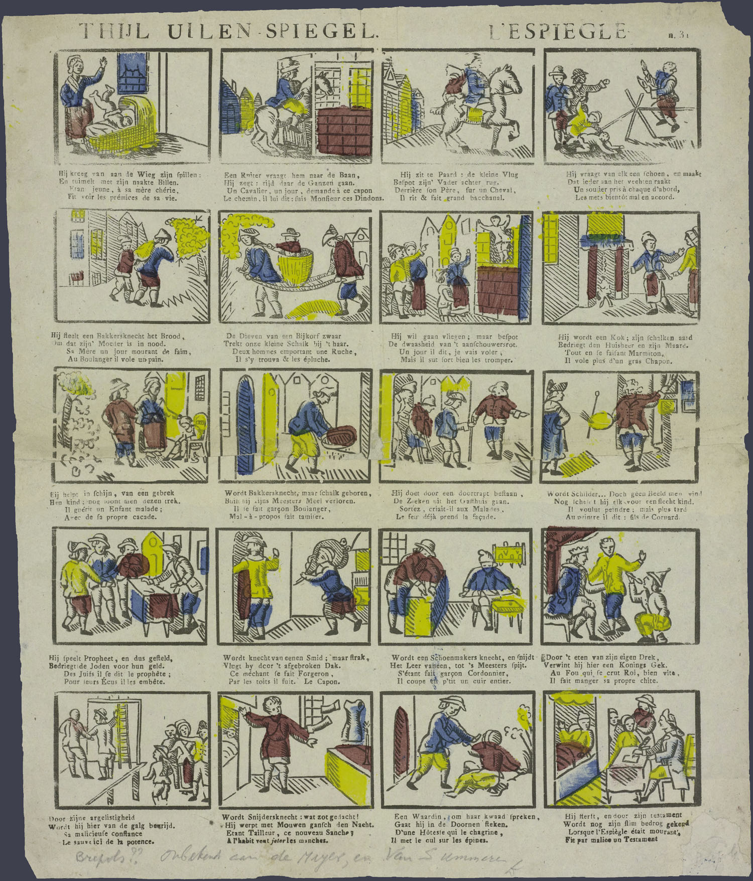 Centsprent met 5 x 4 omkaderde houtsneden, met afbeeldingen uit het verhaal over de schelm Tijl Uilenspiegel, van wieg tot sterfbed. Hij haalt overal waar hij komt streken uit, hij steelt brood, laat zich in een bijenkorf vervoeren, wordt kok en bakkersknecht, schilder, profeet, knecht van een smid, van een schoenmaker en een kleermaker. Met tweeregelige rijmende onderschriften in Nederlands en Frans.